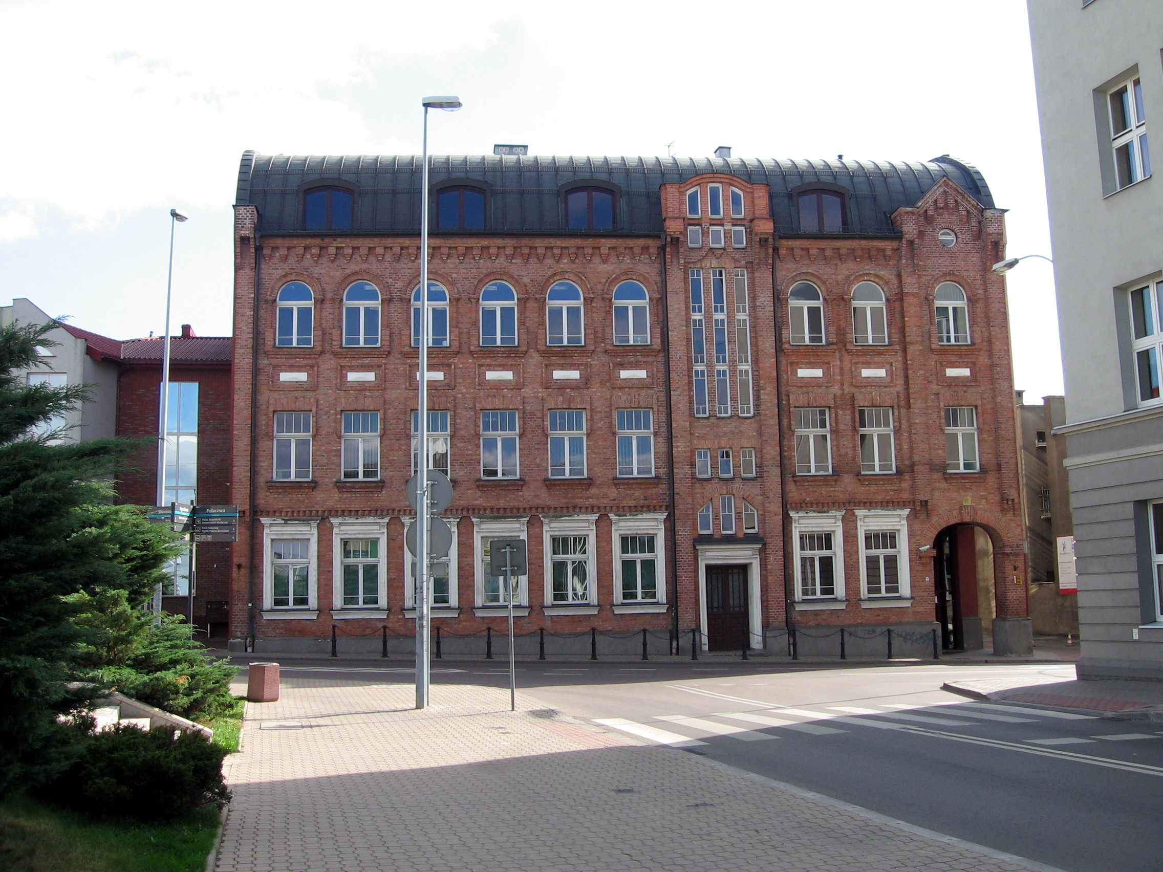 Białystok, ul. Pałacowa 3 - dawna szkoła żydowska, obecnie "Podlaski Oddział NFZ". (zabytek nr 643 z 26.01.1988)